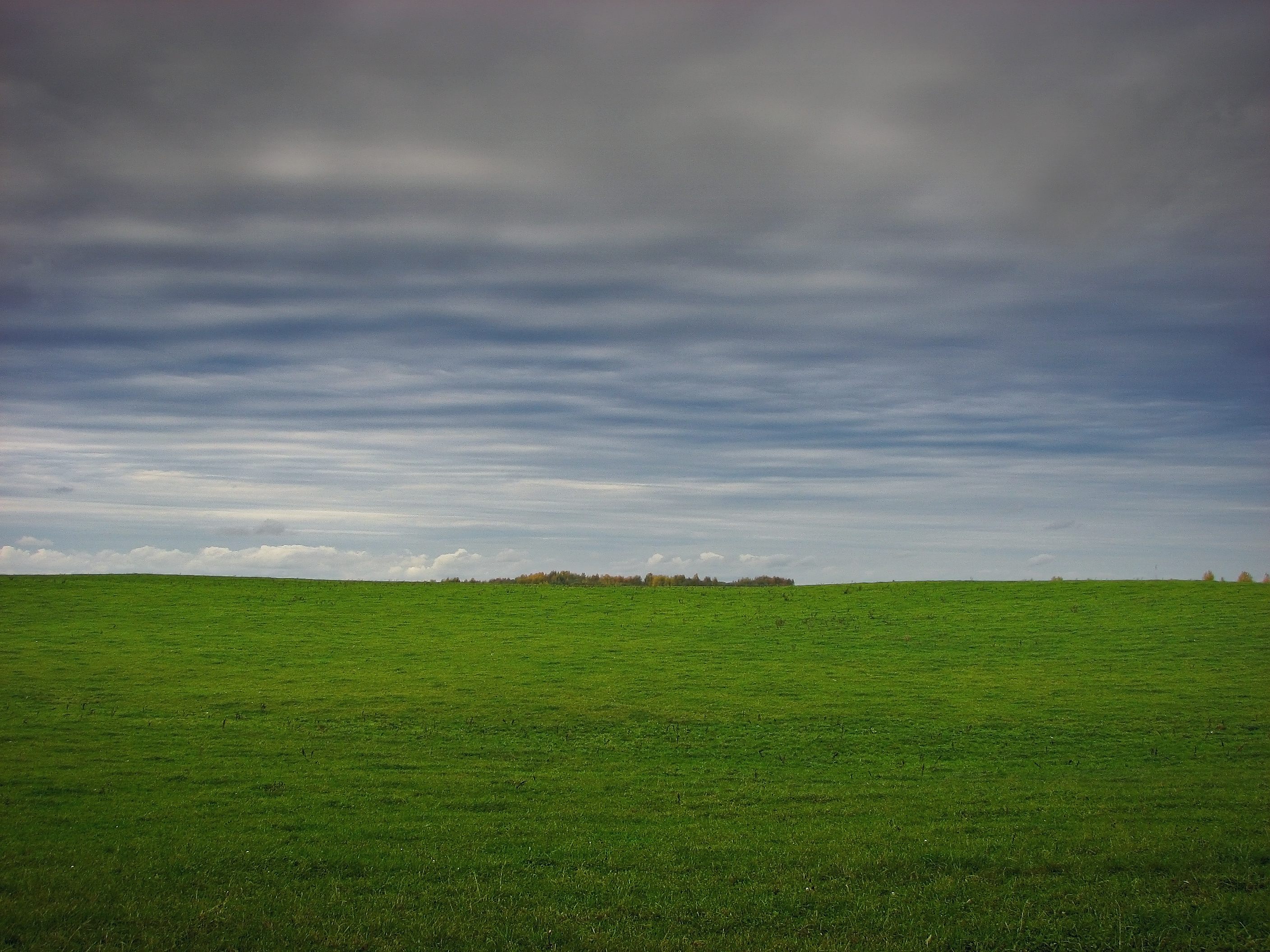 минимализм